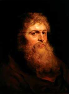 Tronie